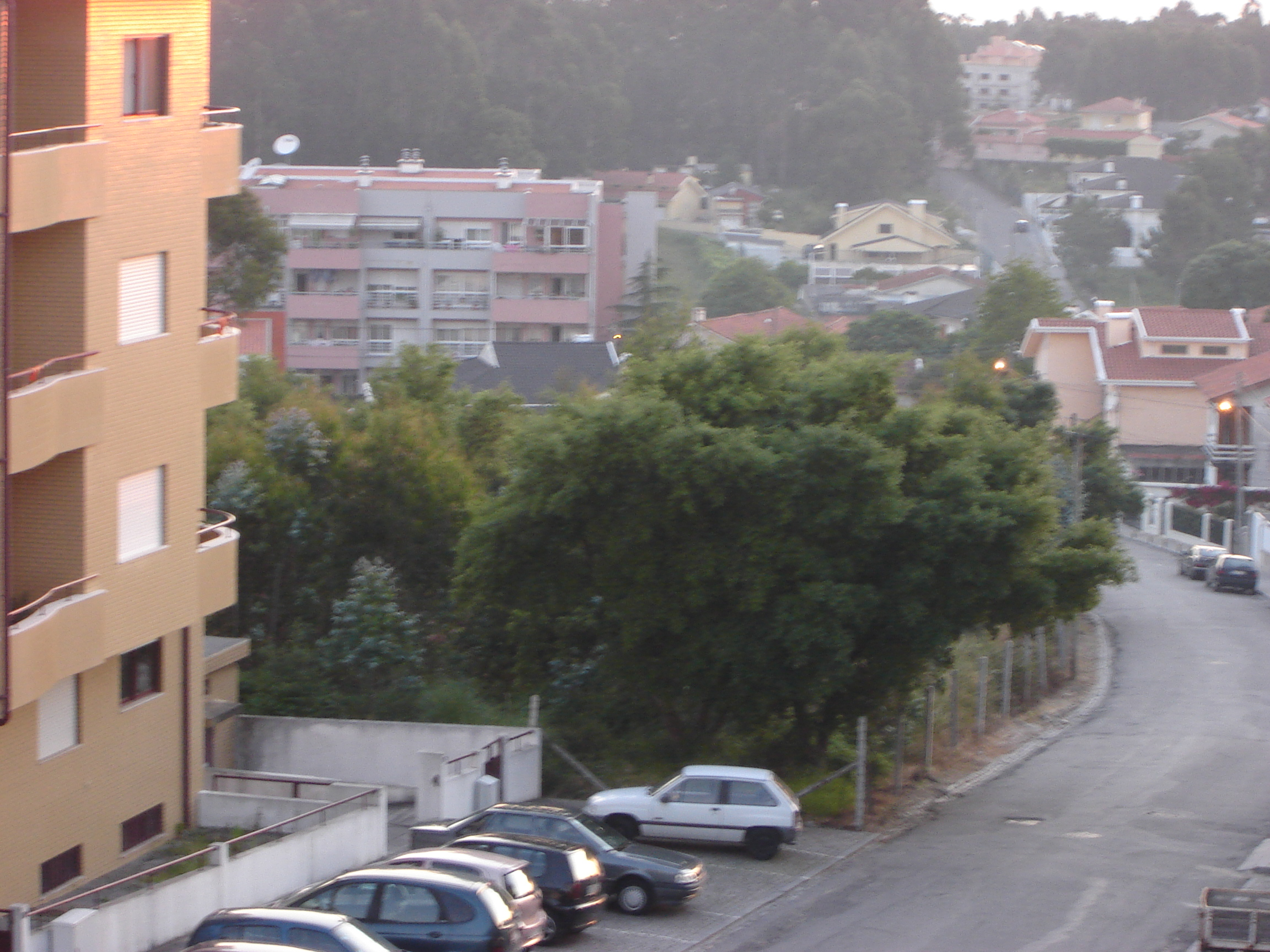 Canelas Gaia Portugal